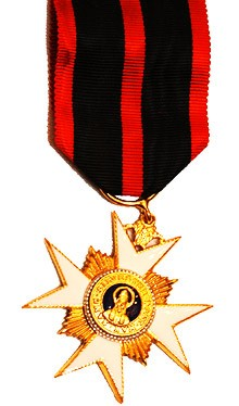 Beschreibung: Silvesterorden 1841 Stifter: Papst Gregor XVI. Abbildung aus: Ordensbuch Kölner Diözesan- und Dombibliothek Lizenz: GNU-FDL